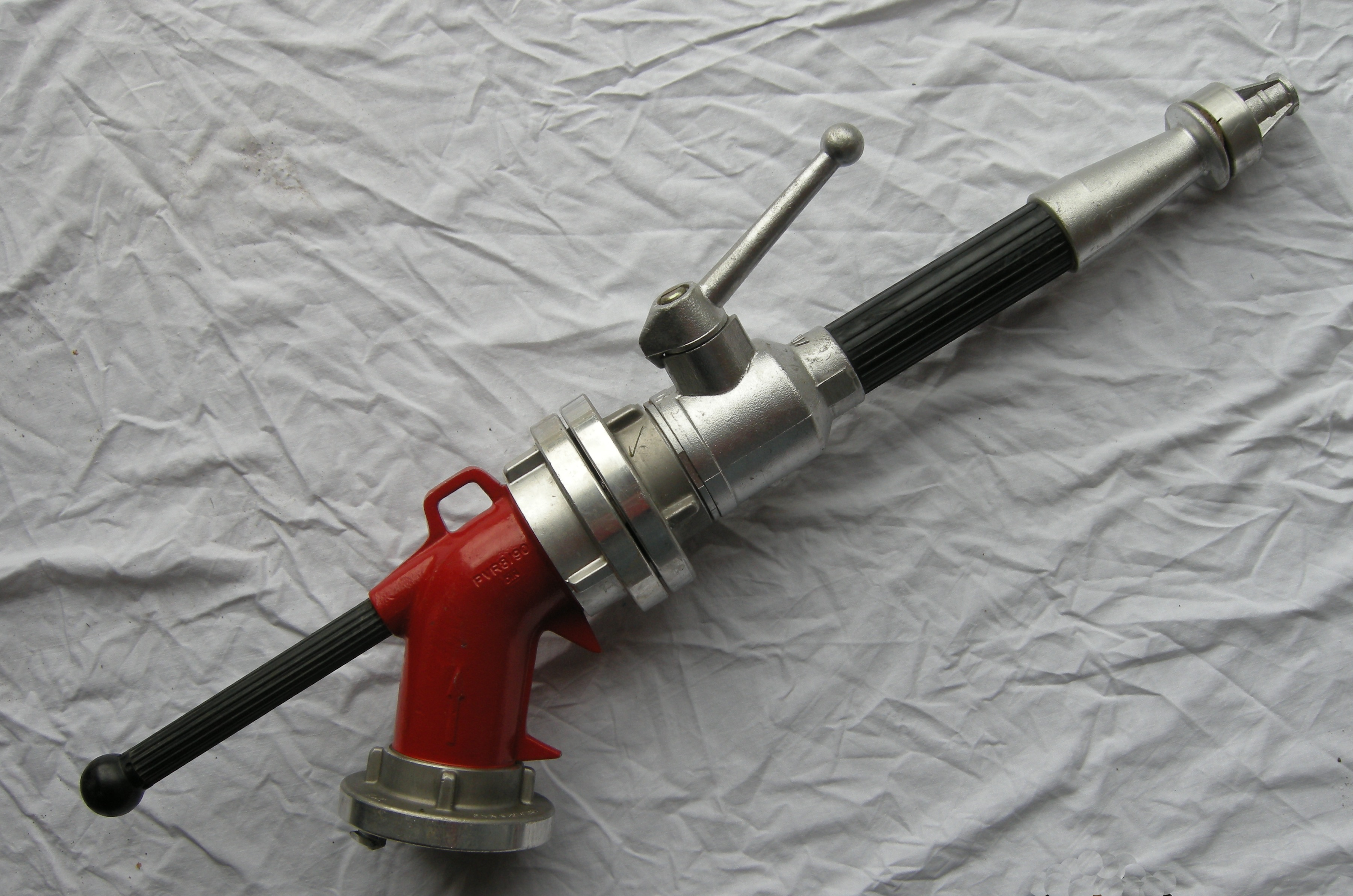 Stützkrümmer mit B-Strahlrohr der Freiwilligen Feuerwehr Mönchhagen